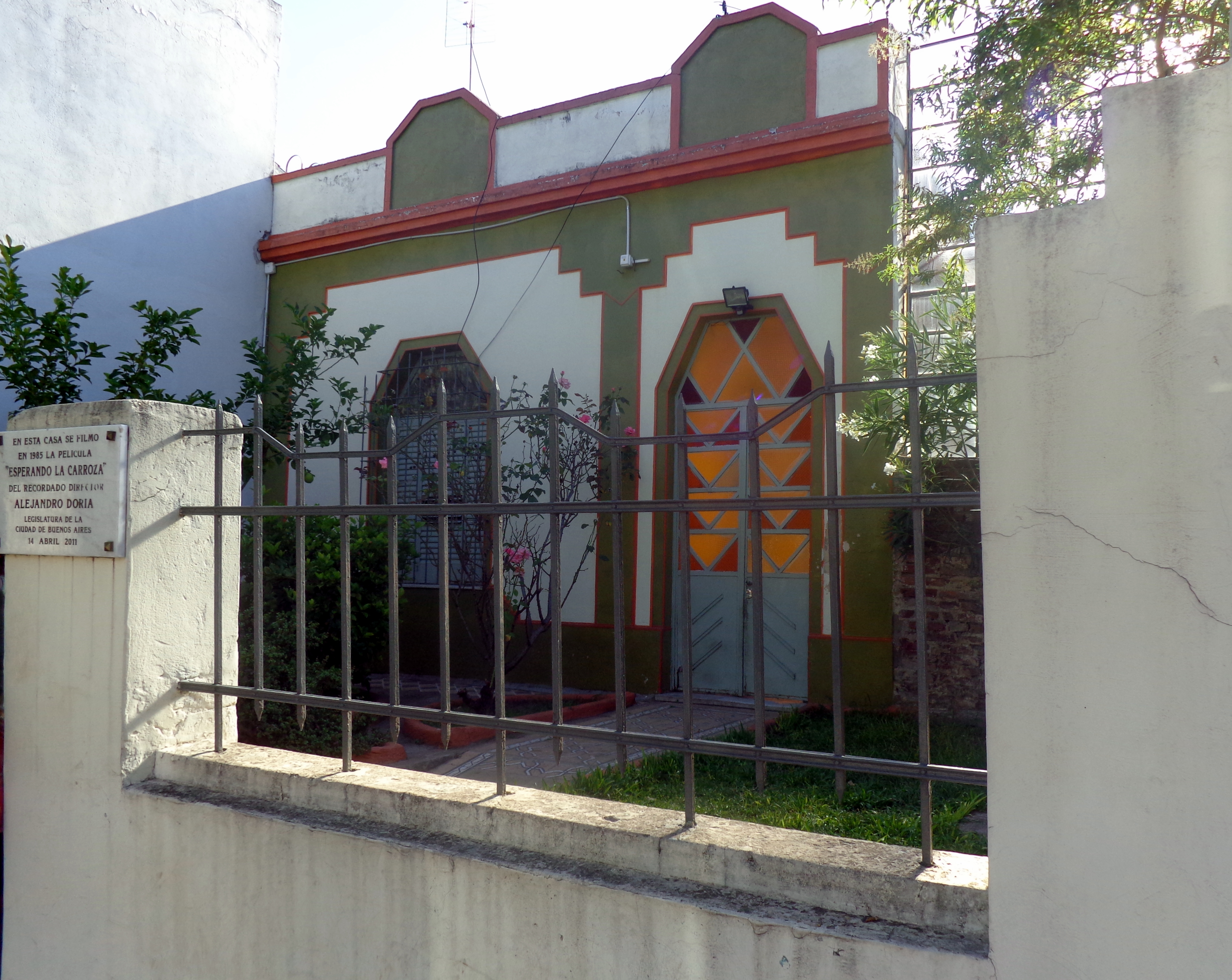 La casa utilizada como escenario de muchas de las escenas de la película Esperando la Carroza (1985). Echenagucía 1232, en el Barrio de Versalles, Ciudad de Buenos Aires, Argentina.